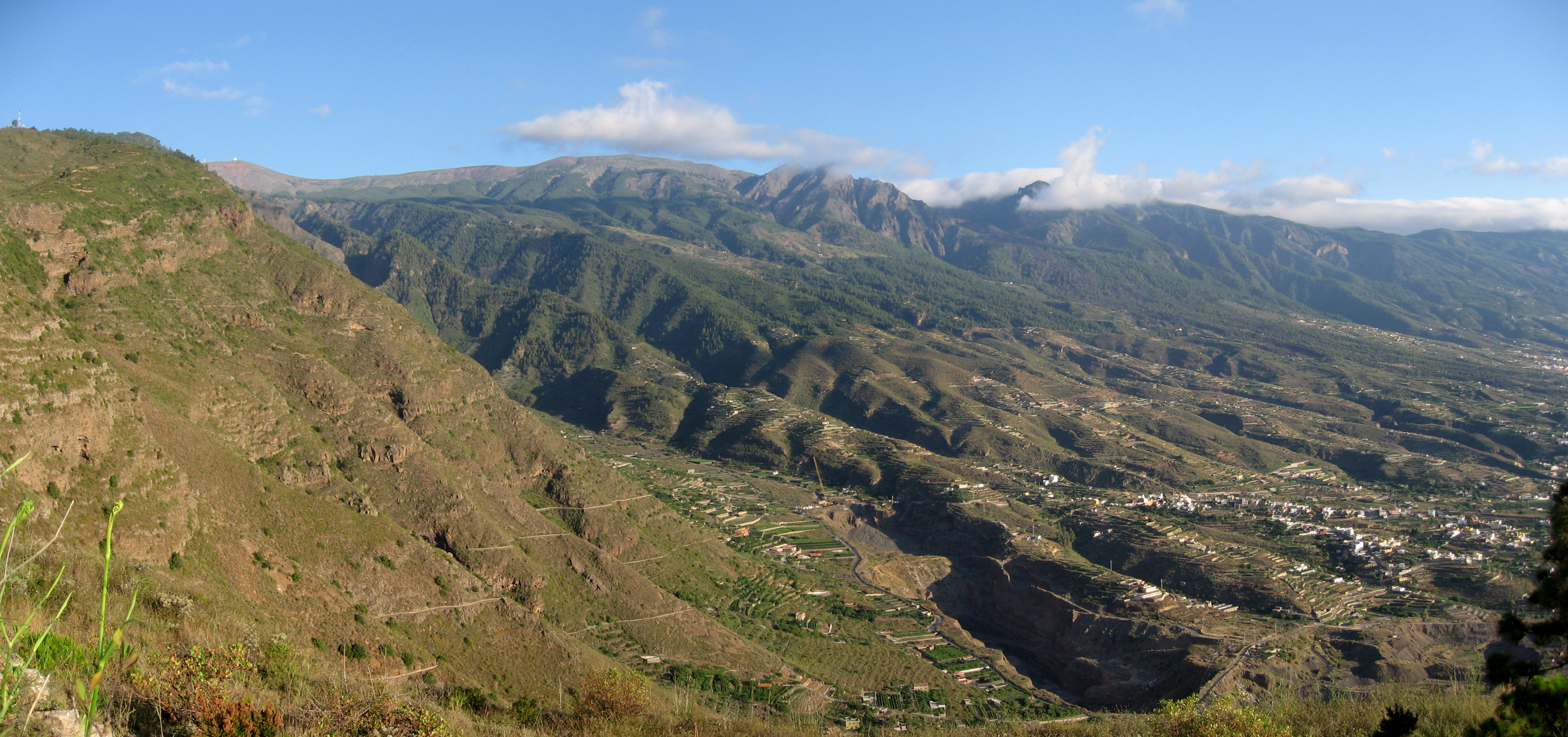 Güímar, Tenerife, Canarias